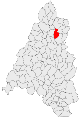 Categorie:Hărţi ale judeţului Bihor